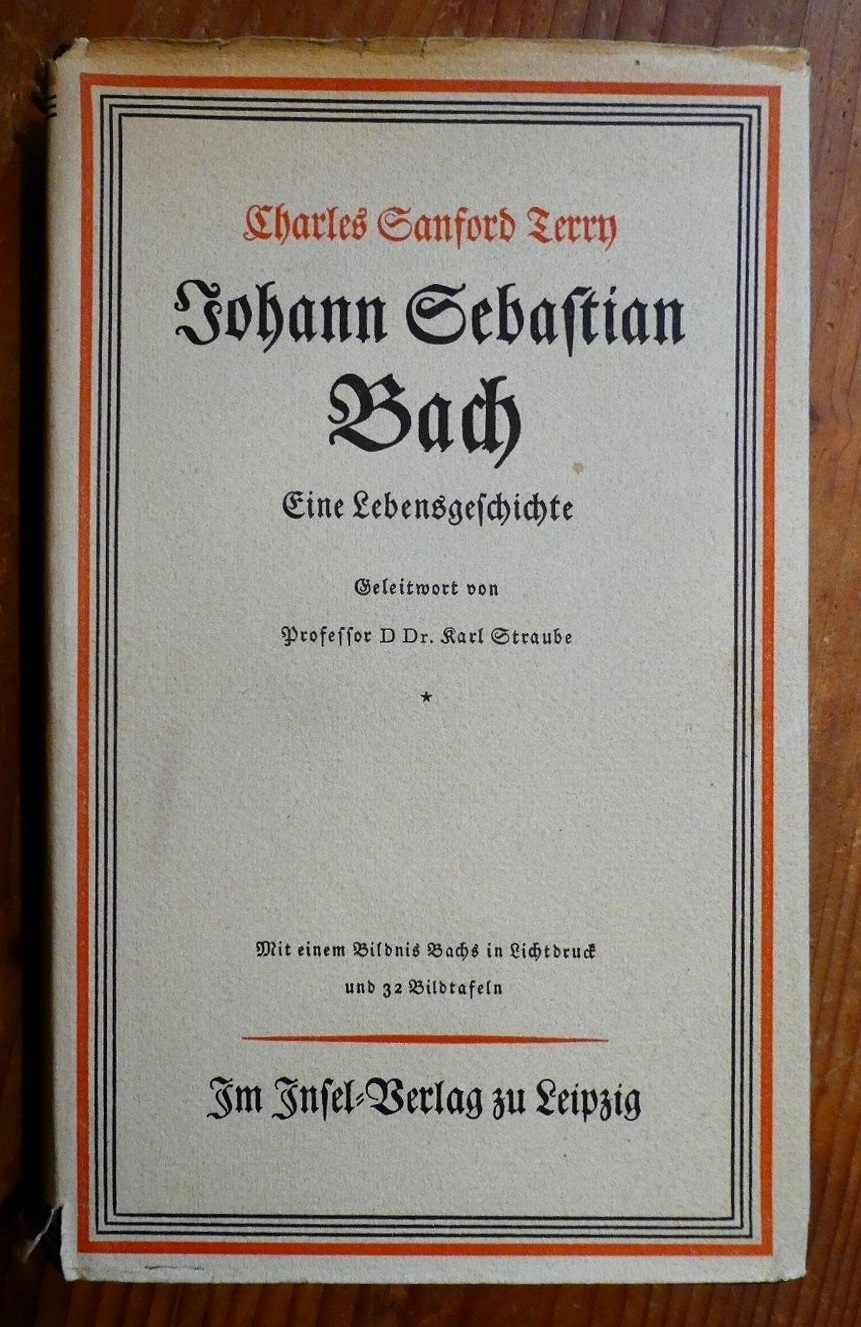 Charles Sanford Terry: Johann Sebastian Bach. Eine Lebensgeschichte. Mit einem Geleitwort von Karl Straube. Leipzig 1950 (Übersetzung von: Ders.: Bach. A Biography. Oxford 1928)